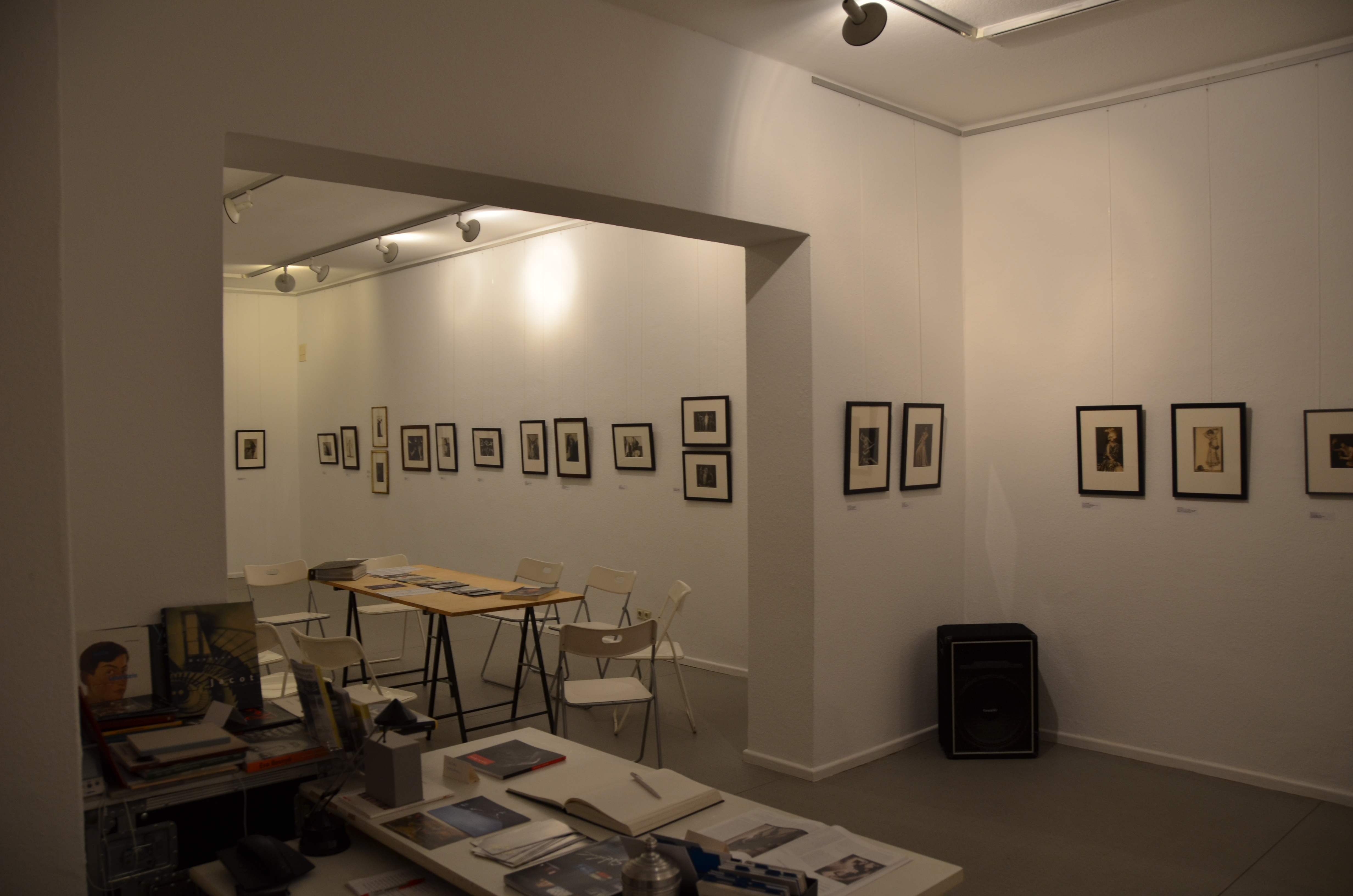 Ausstellungsraum in „Das Verborgene Museum“. Titel der Ausstellung: „Tanz der Hände“. Tilly Losch und Hedy Pfundmayr in Fotografien 1929-1935. (Vom 9.9.2015 bis 21.02.2016).